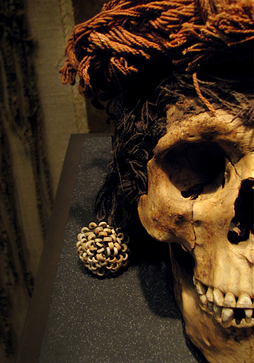 Cráneo descubierto en la Cueva de la Candelaria (Coahuila, México). Se exhibe en la sala Culturas del Norte del Museo Nacional de Antropología de México.